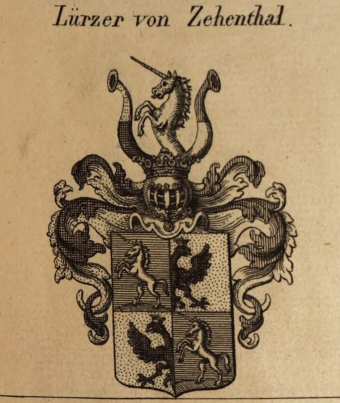 Wappen des Adelsgeschlechts der Lürzer von Zechenthal